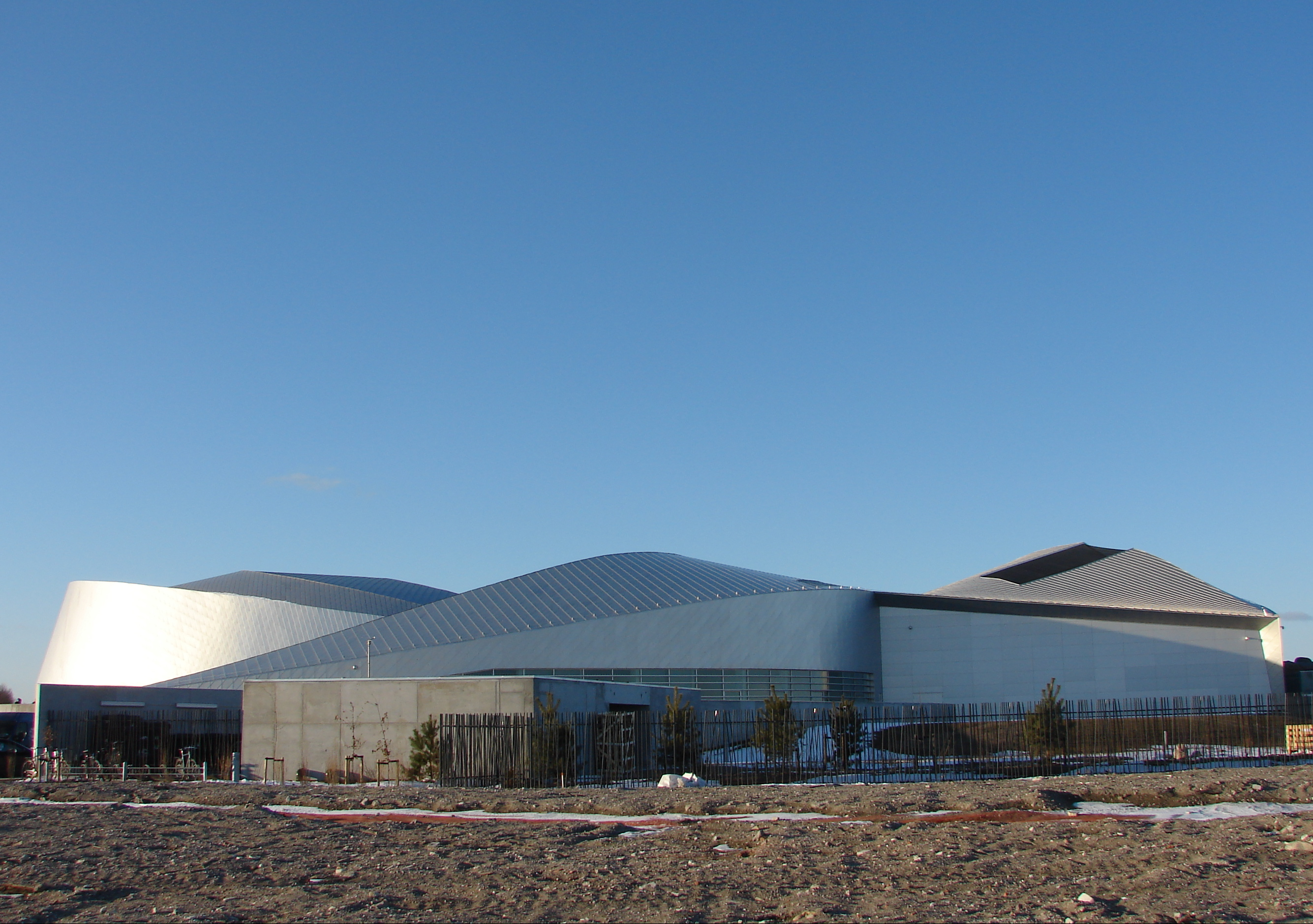 Den Blå Planet, Danmarks Akvarium, tegnet af 3XN, Jacob Fortlings Vej, Kastrup, Amager.